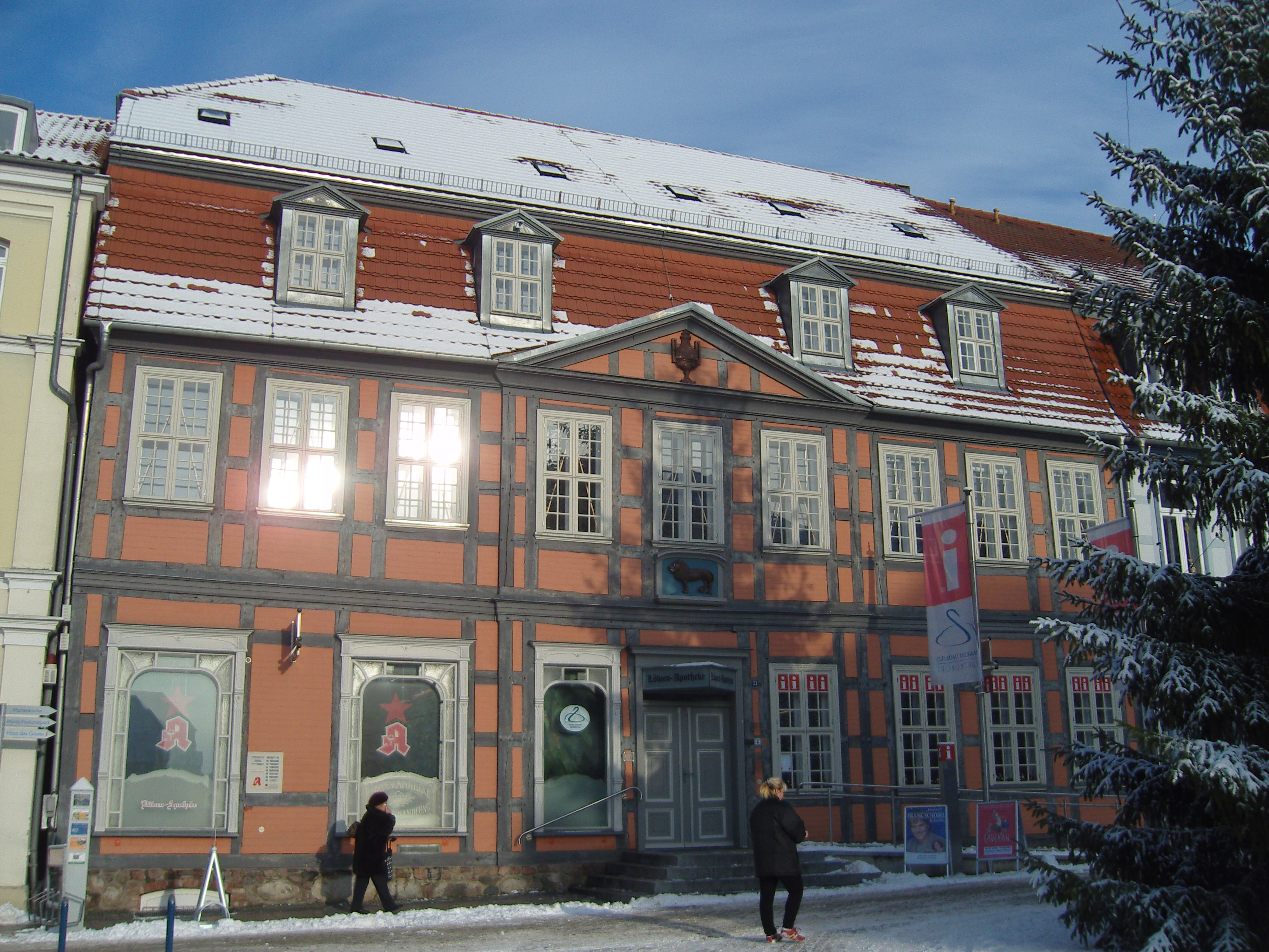 Löwenapotheke am Markt in Waren (Müritz) - denkmalgeschütztes Gebäude This is a photograph of an architectural monument.